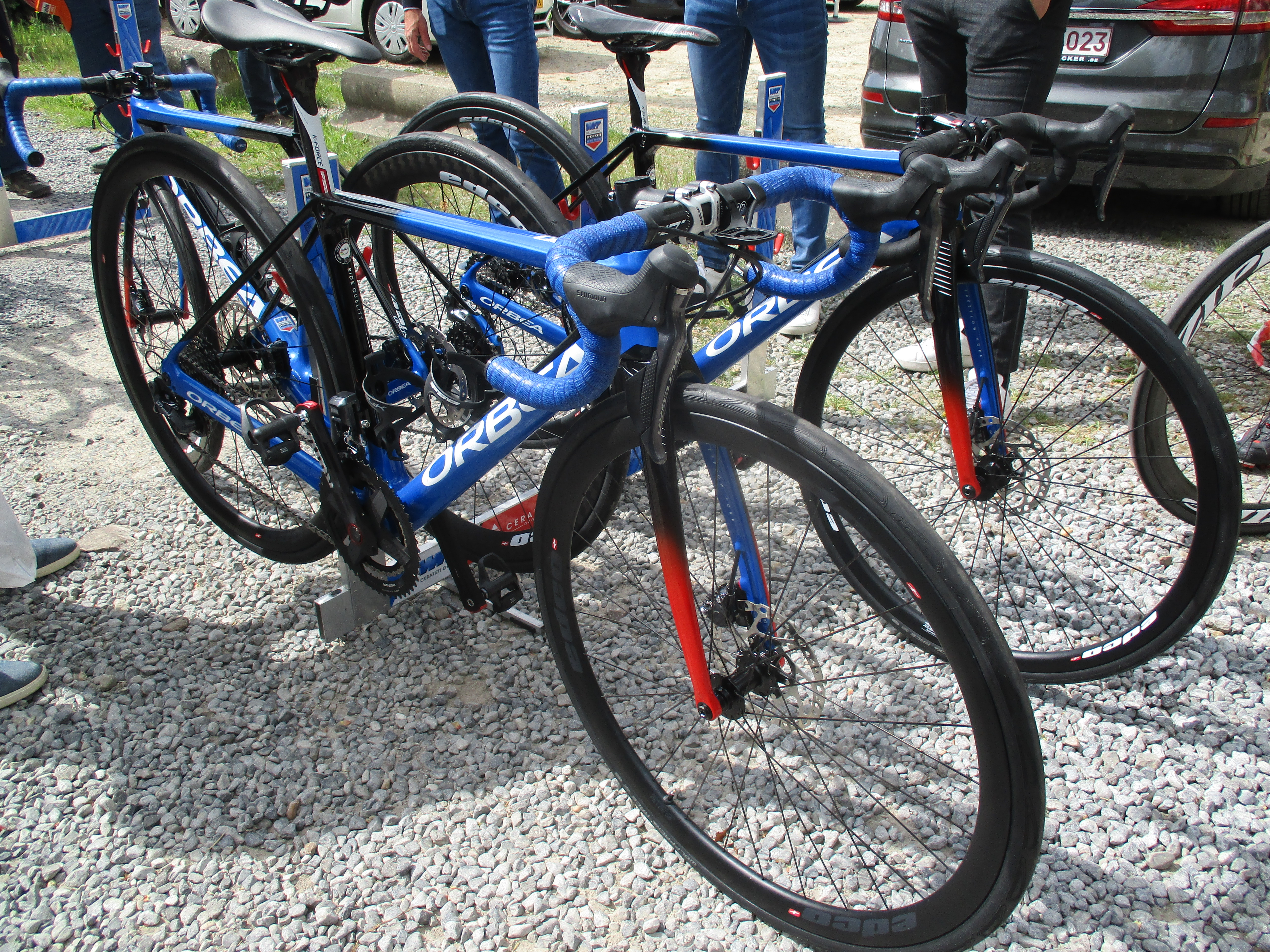 Waalse Pijl 2019 voor vrouwen op de Mur de Huy